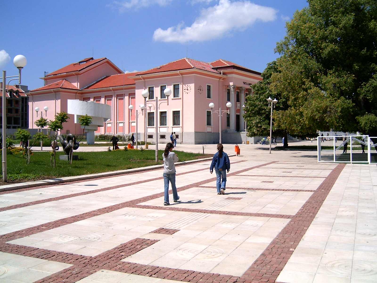 © 2005 Димитър Колев